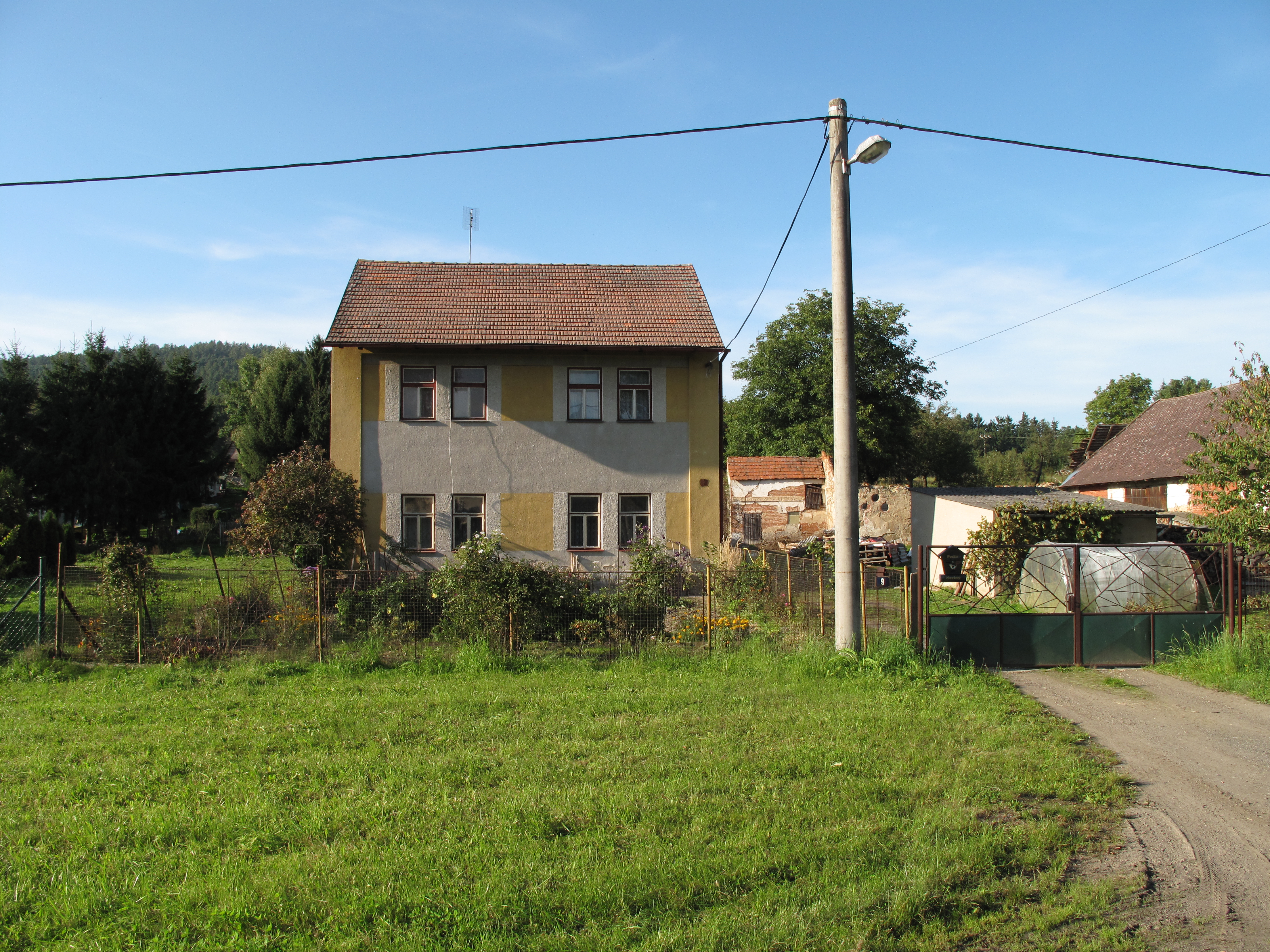 Dům a sloup v Neštěticích. Okres Benešov, Česká republika.